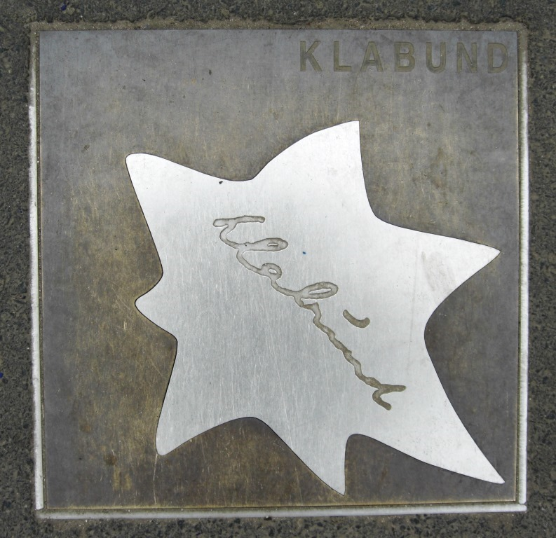 Gedenkplatte im Walk of Fame „Sterne der Satire“ in Mainz für den Schriftsteller Klabund (1890-1928)